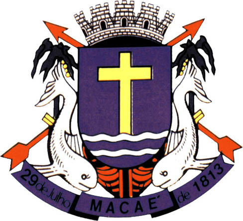 Brasão de Macaé, Rio de Janeiro Fonte: Museu da Cidade de Macaé